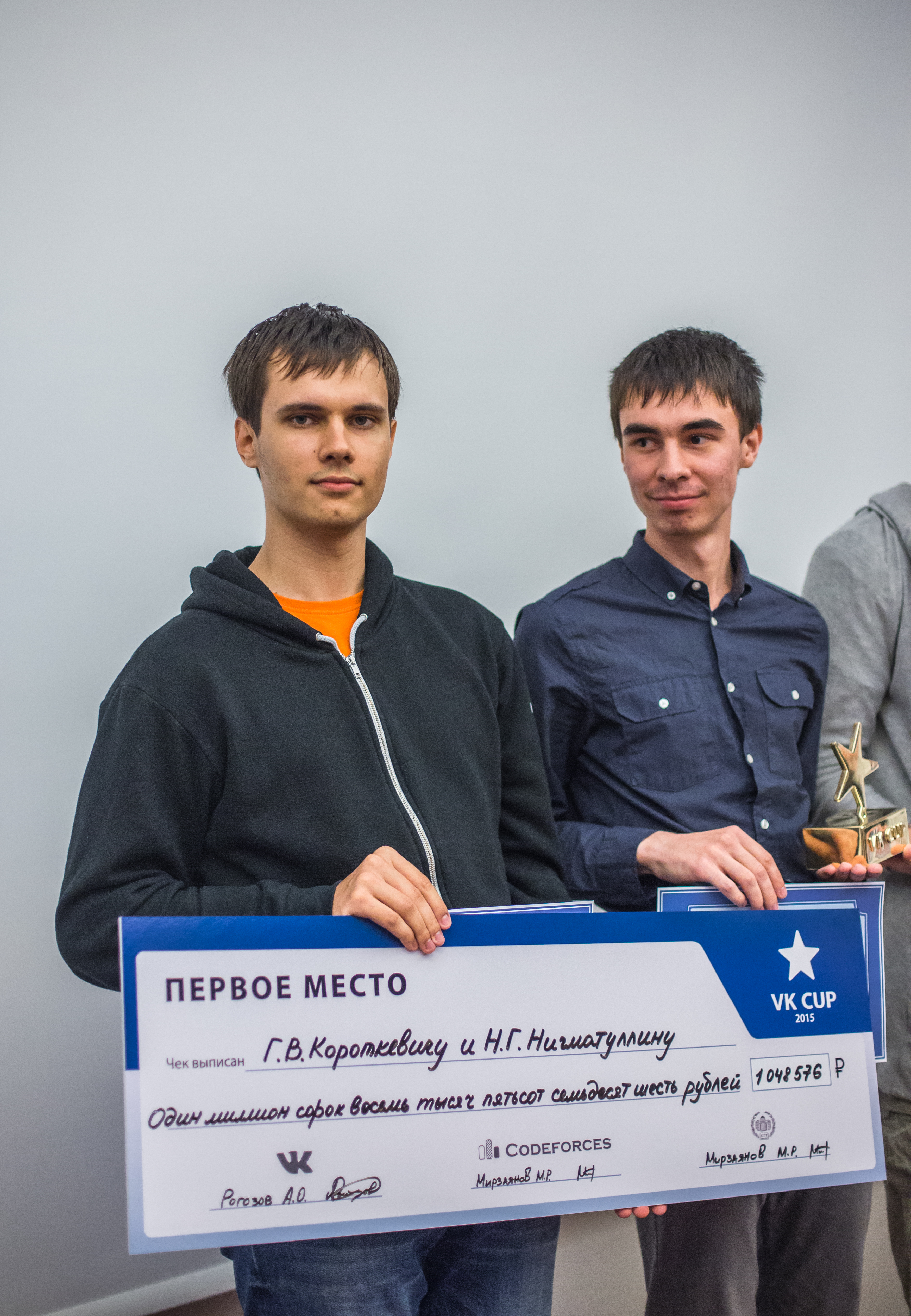 Победители VK Cup — студенты Университета ИТМО